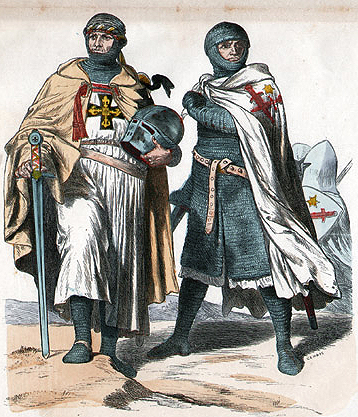 Hofmeiser des Deutschen Ordens / Schwertbrüder